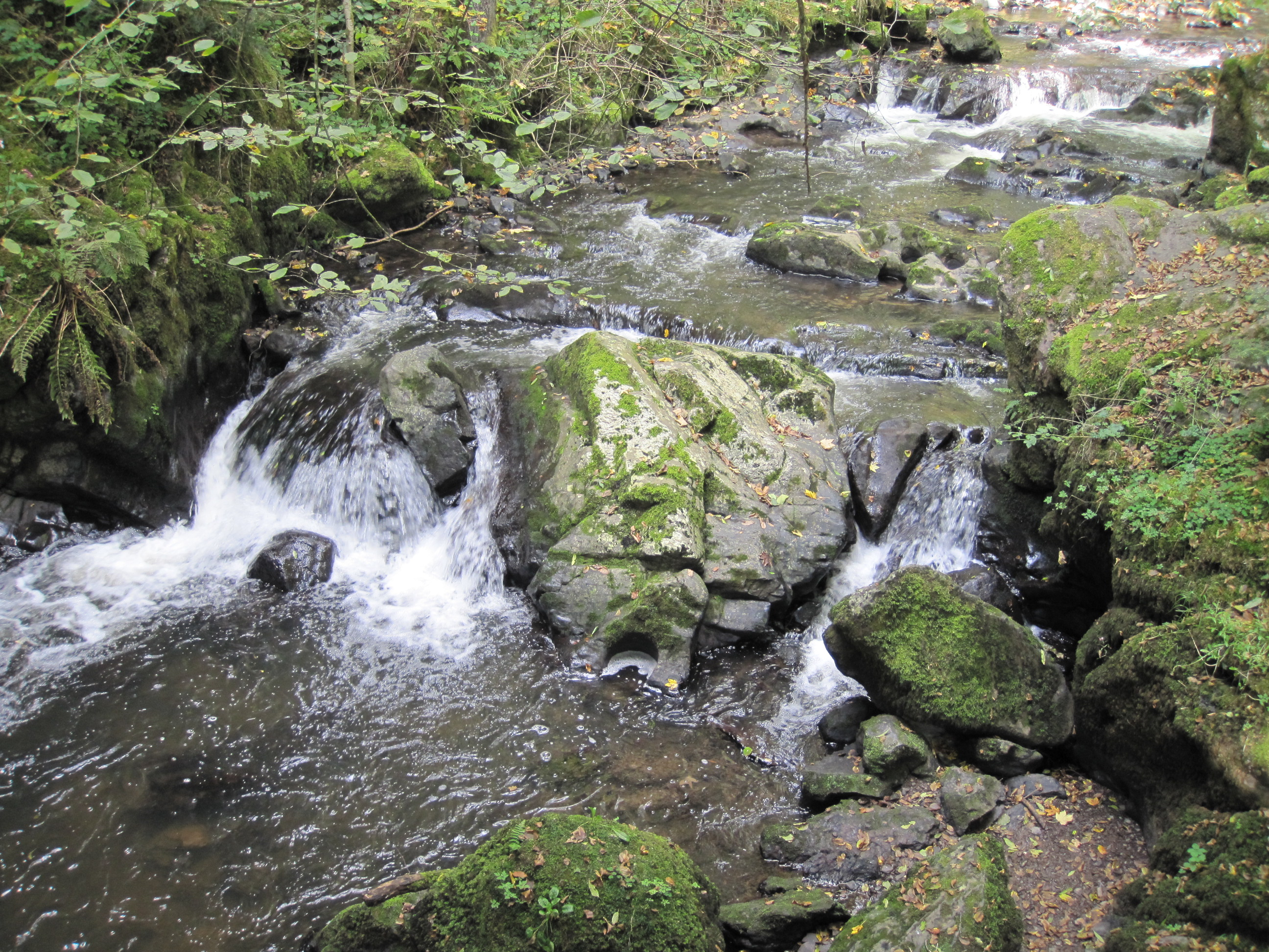 Wasserfall nahe Wolfsschlucht